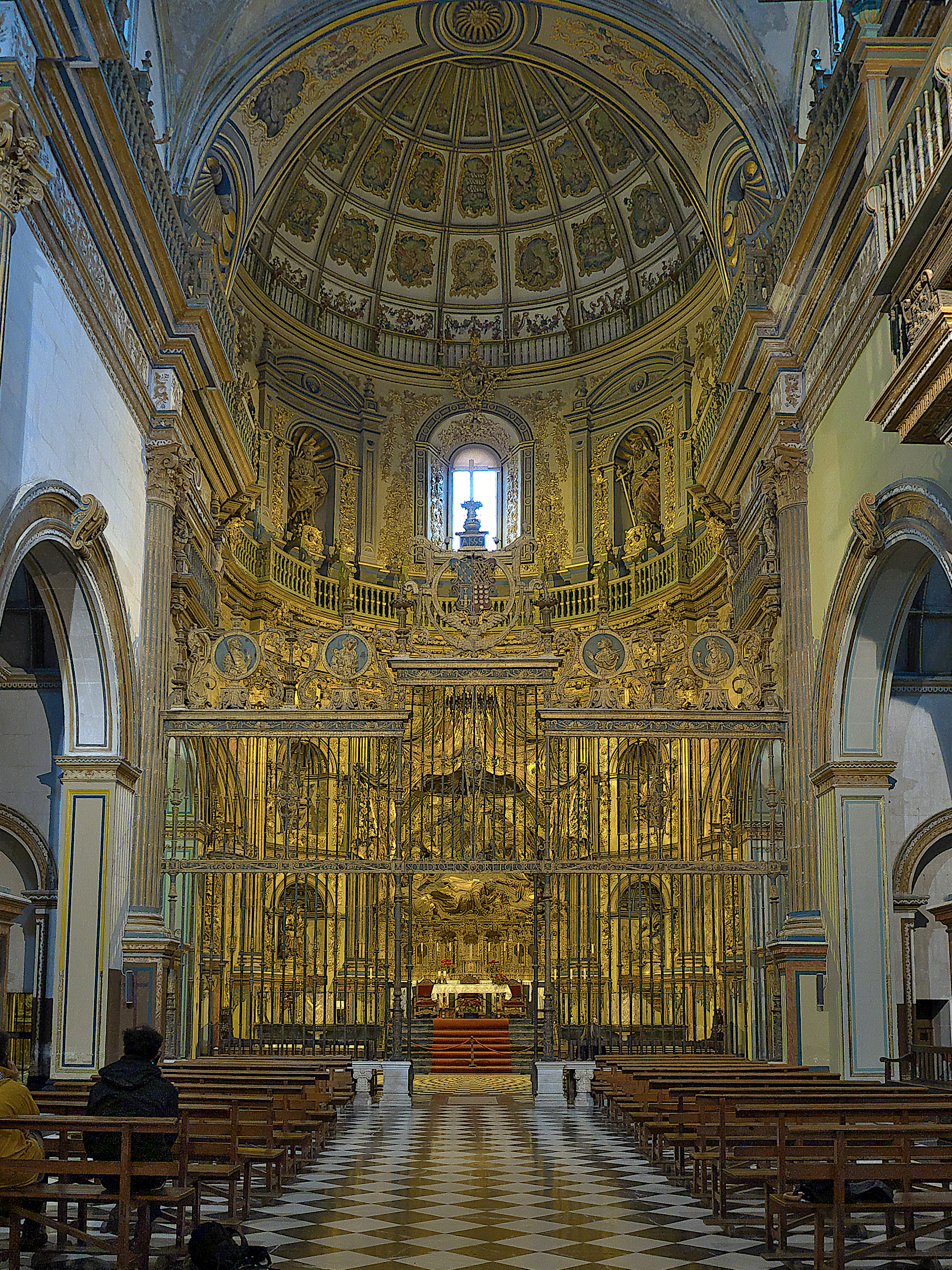 Diego de Siloé, cabecera de la Sacra Capilla de El Salvador (Úbeda).